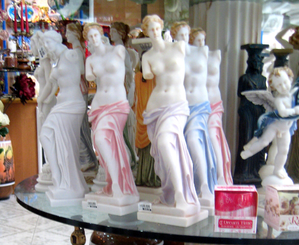 Souvenirs